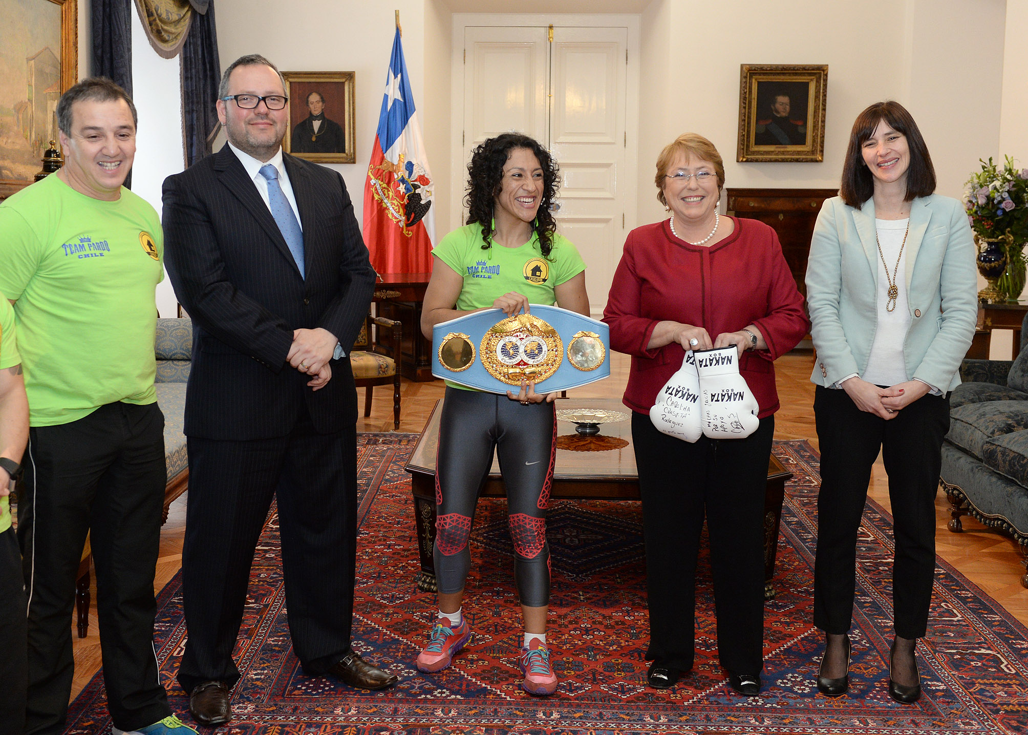 Gobierno de Chile